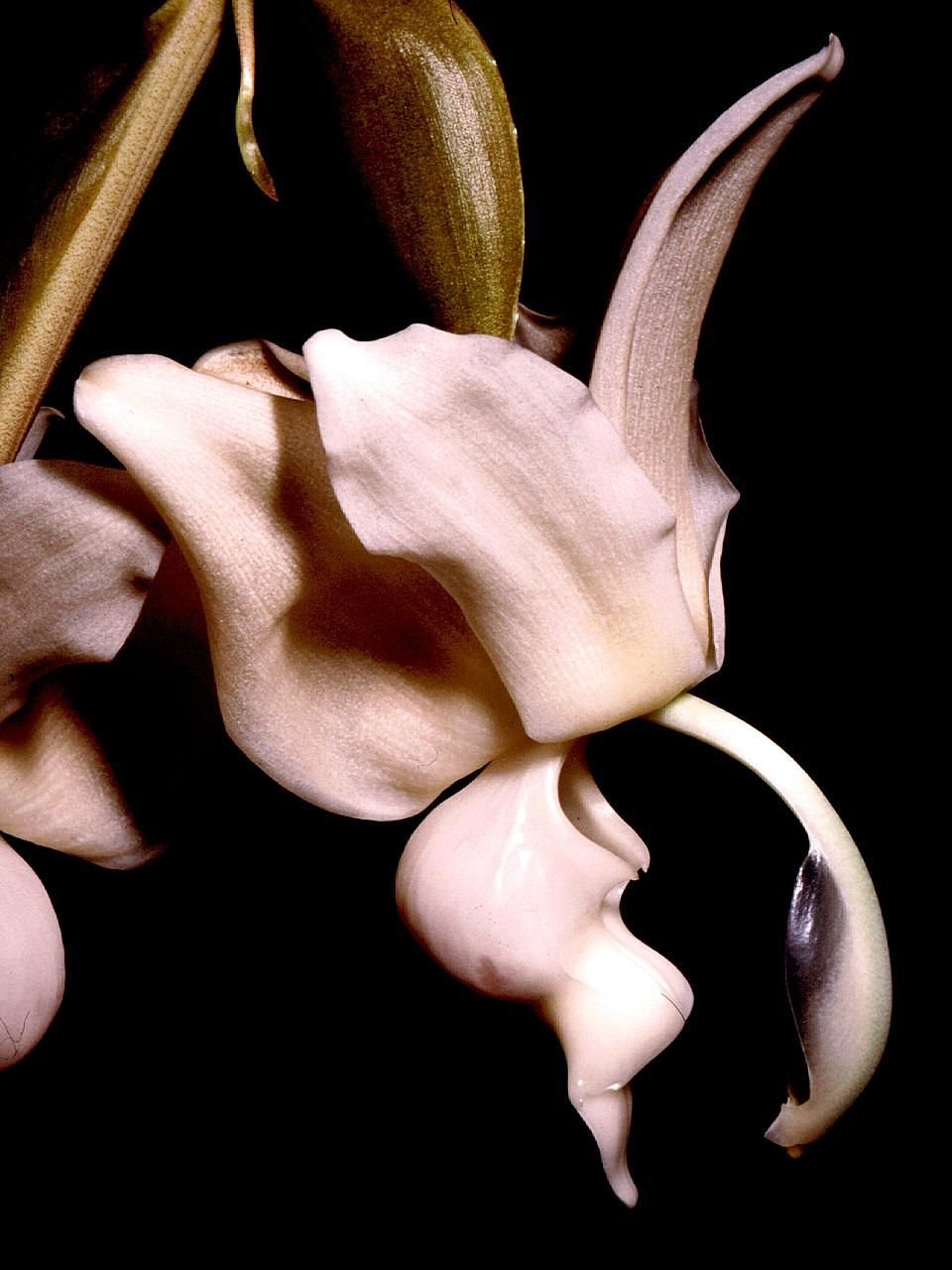 Stanhopea reichenbachiana